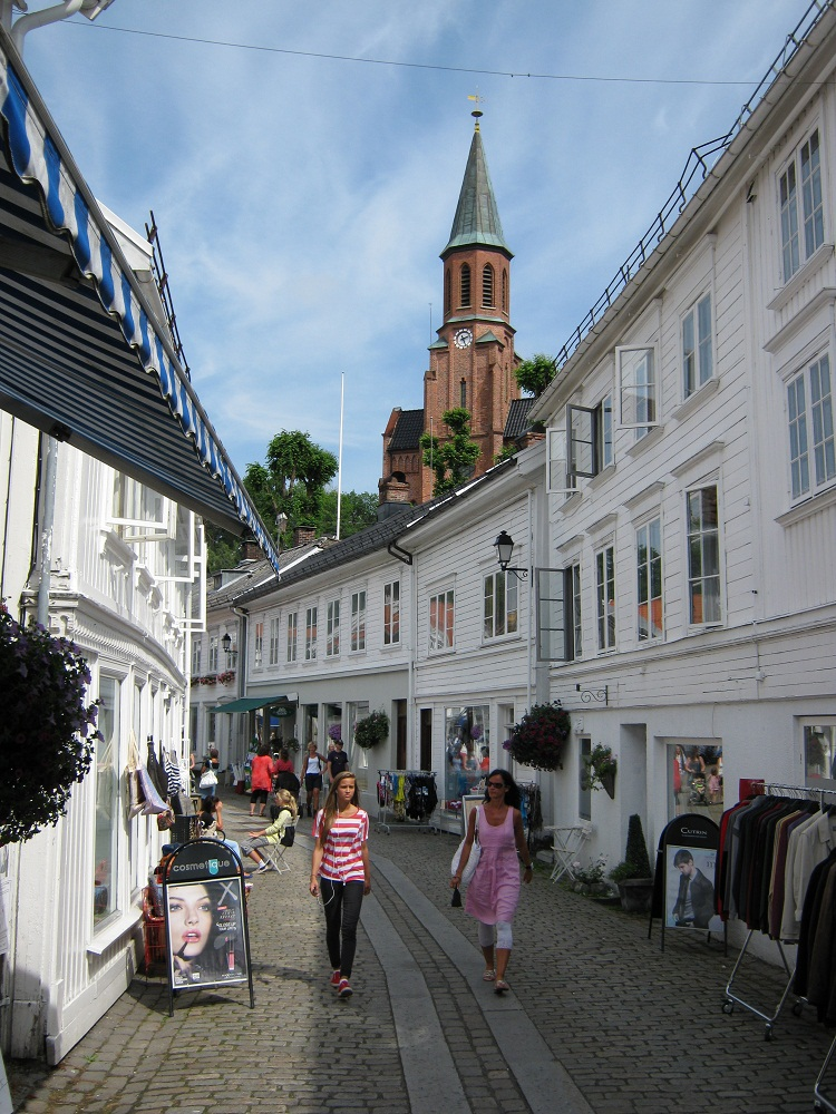 Gågaten i Tvedestrand, Norge